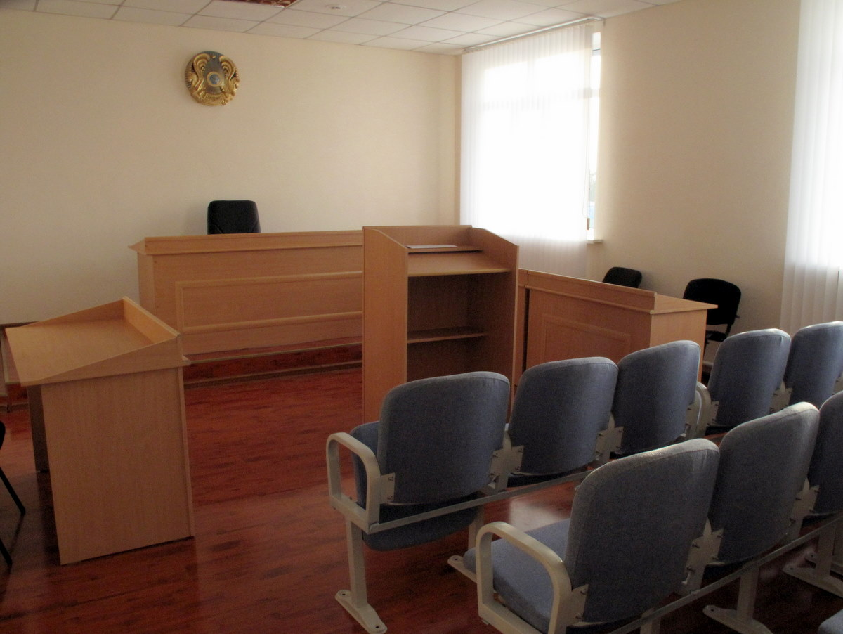 in Kazakhstan